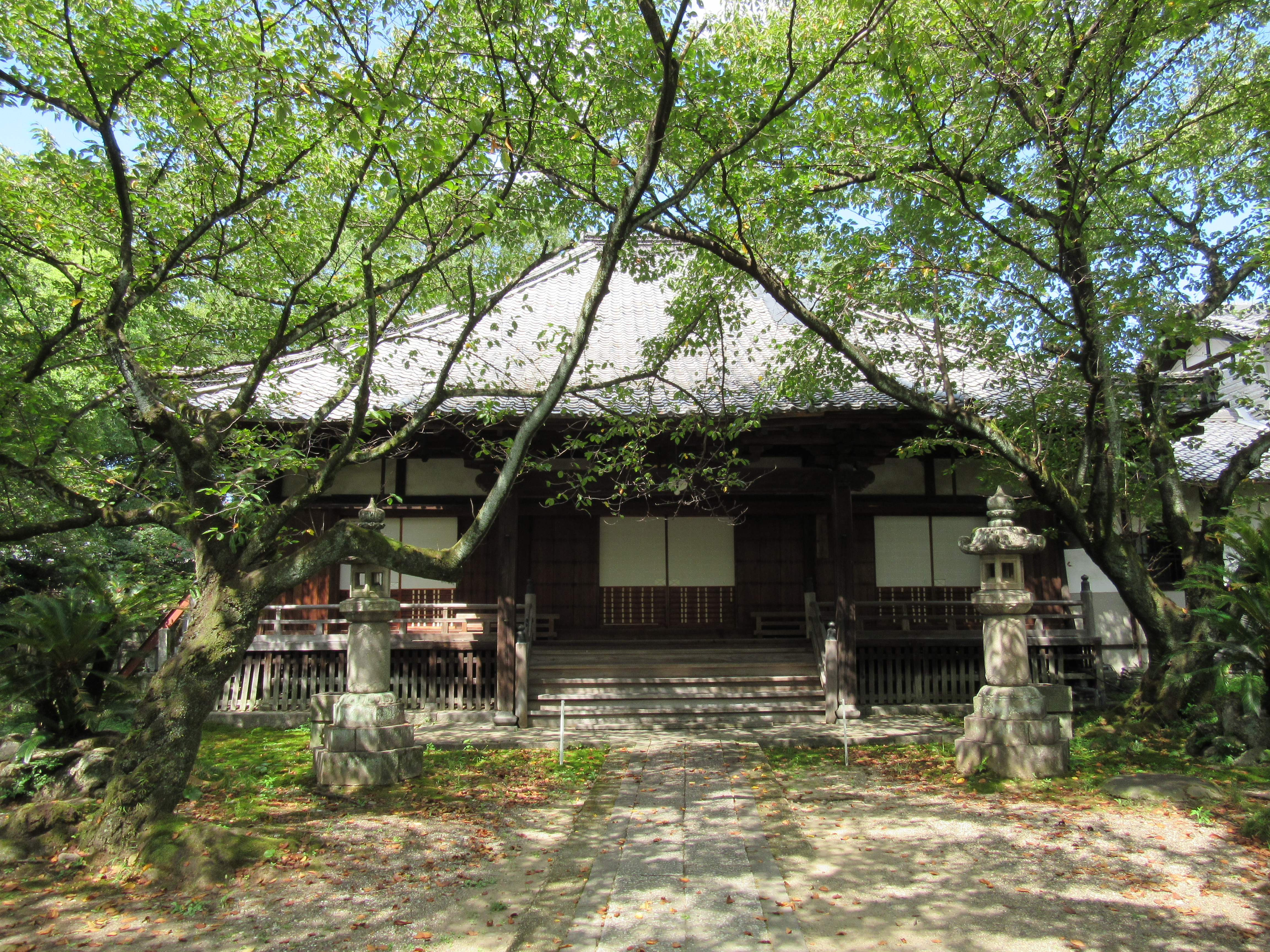 法華寺本堂（岐阜市）